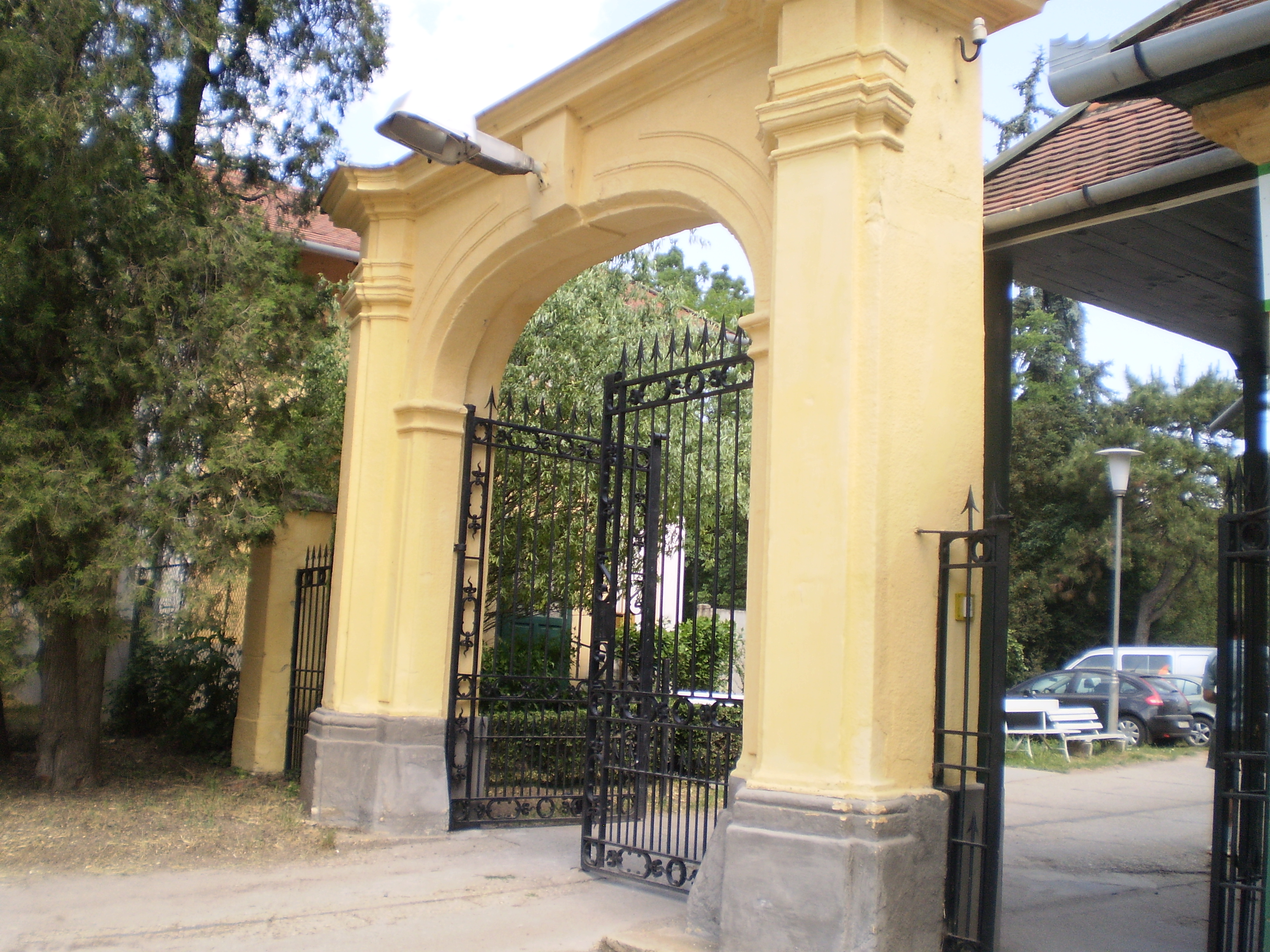 A nagymágocsi Károlyi-kastély bejárata.